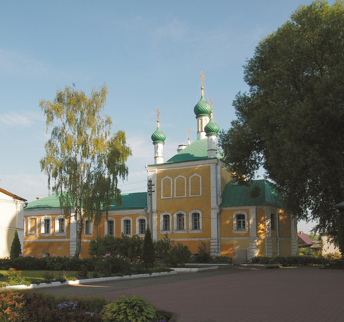 Храм в честь Благовещения Пресвятой Богородицы